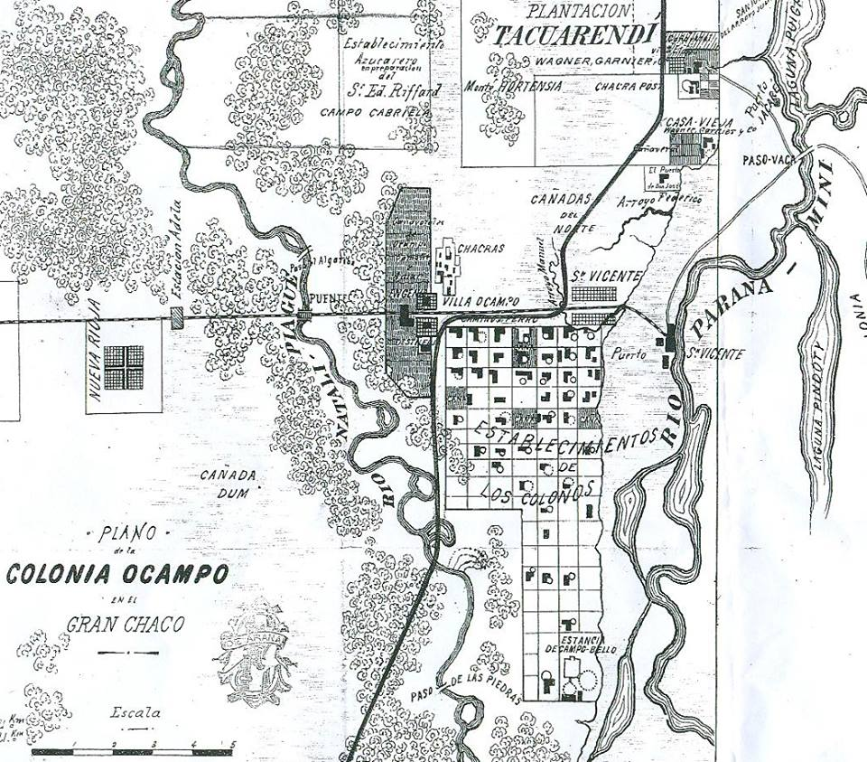 Plano antiguo de la antigua Colonia Ocampo